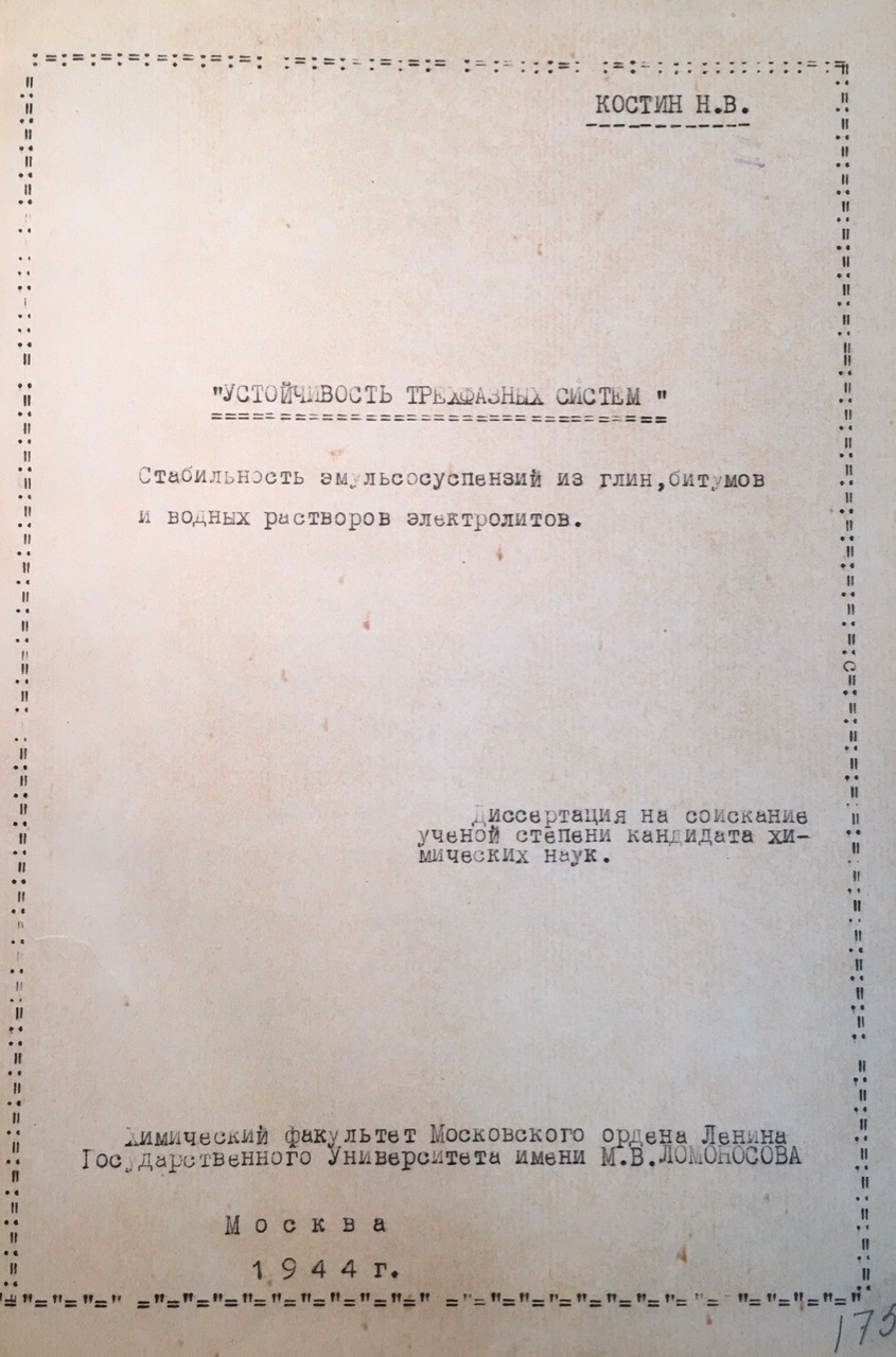 Устойчивость трехфазных систем. Стабильность эмульсосуспензий из глин, битумов и водных растворов электролитов. Диссертация на сосискание ученой степени кандидата химических наук.